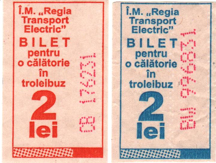 Билет на троллейбус, Кишинёв